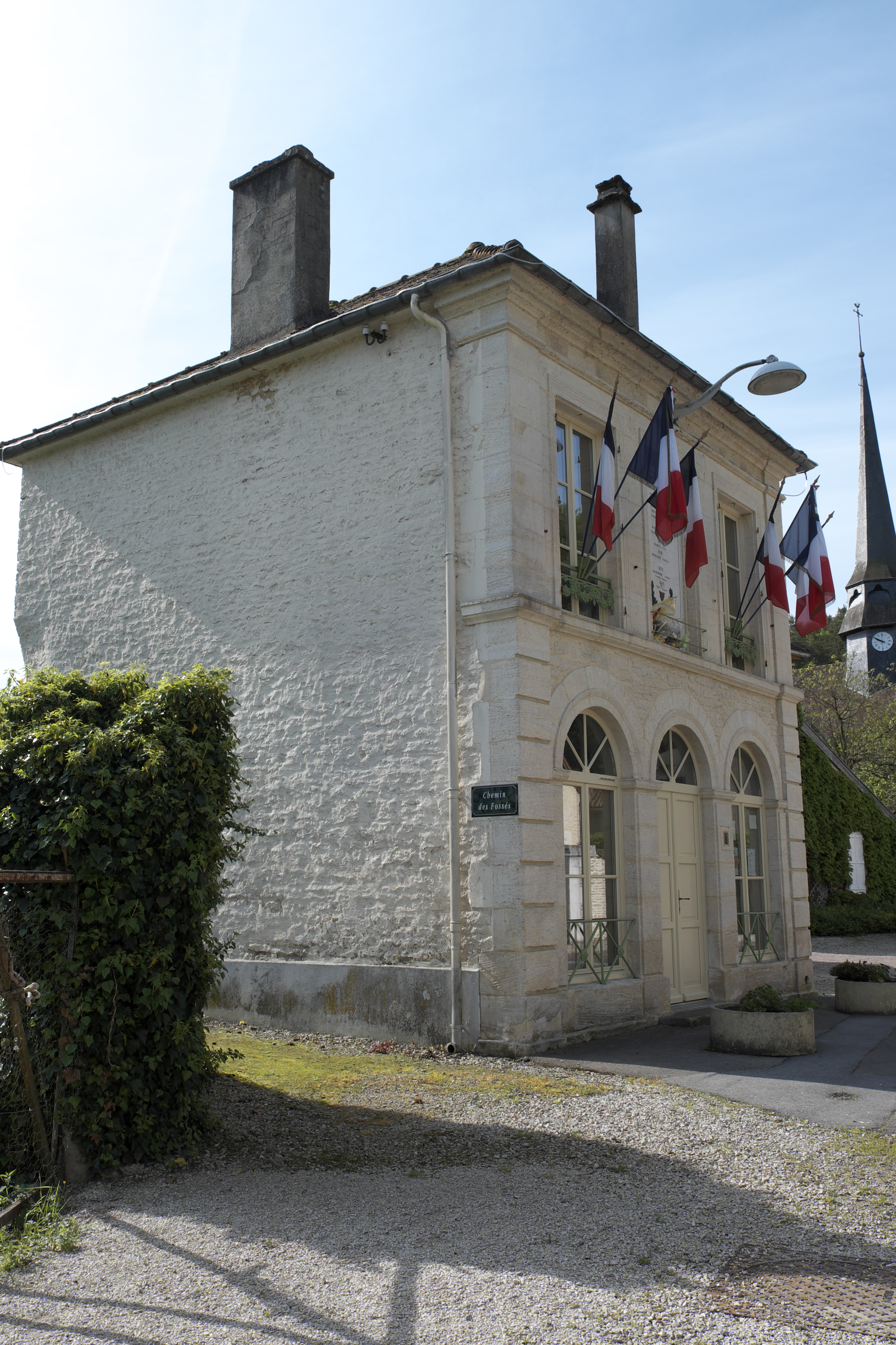 Rathaus (Mairie) in Jaucourt (Aube) im Département Aube (Champagne-Ardenne/Frankreich)